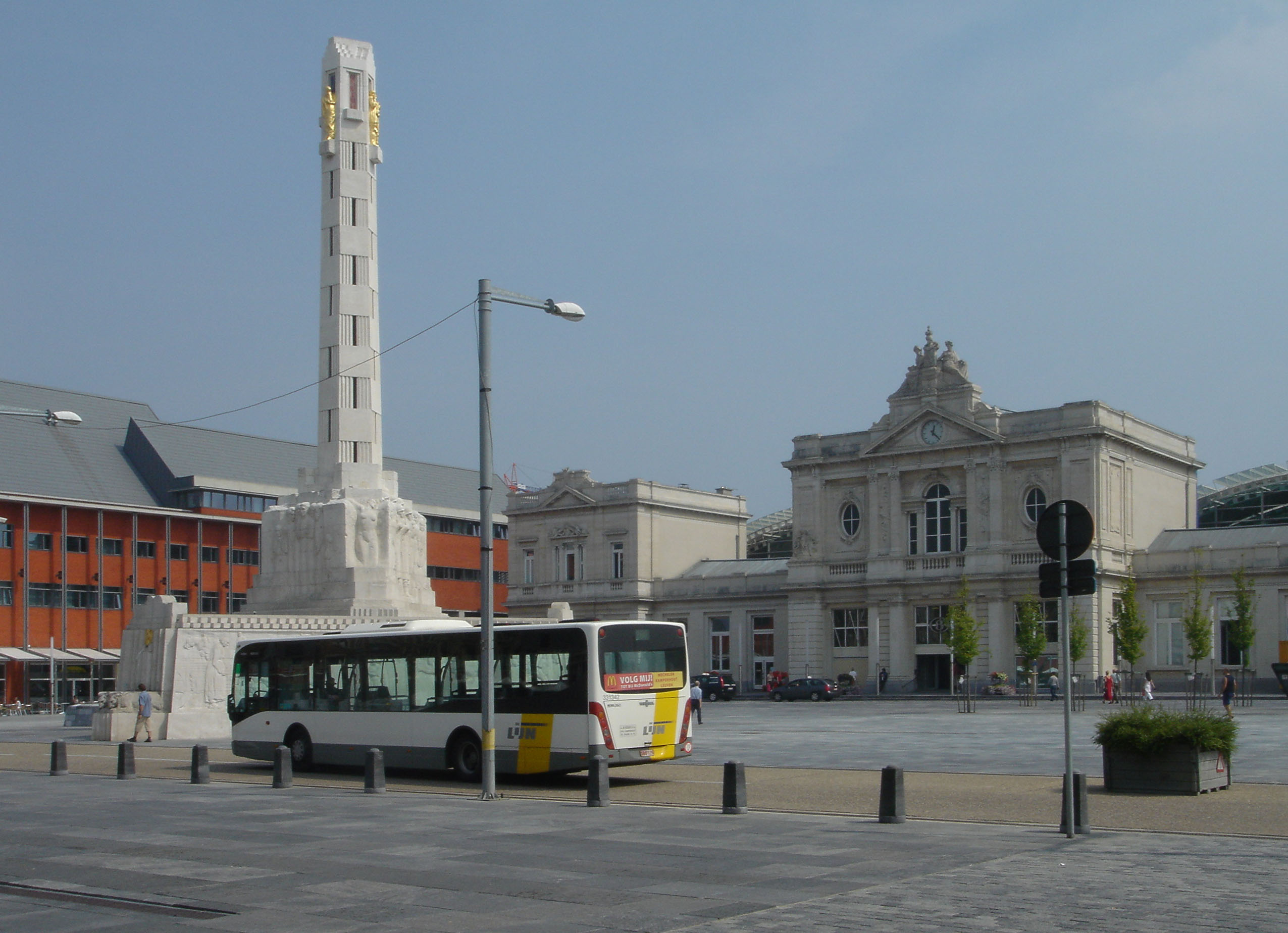 Het trein- en busstation aan het Martelarenplein in Leuven met het oorlogsmonument ter nagedachtenis van de gesneuvelde soldaten en burgers tijdens de oorlog 1914-1918